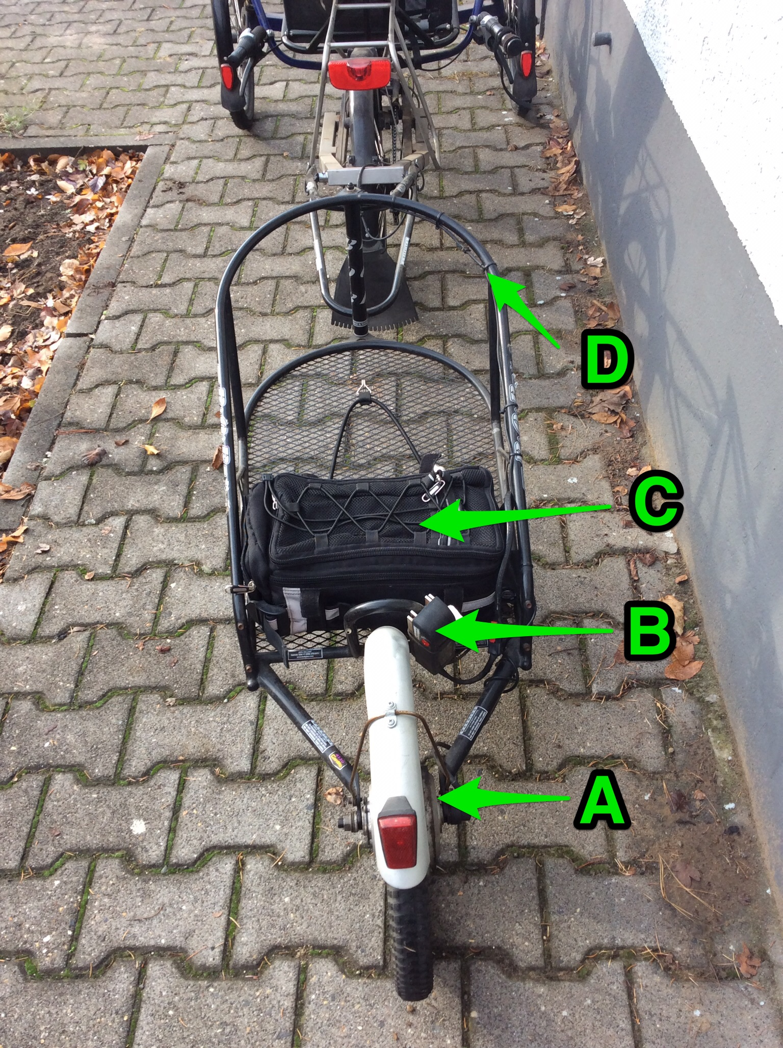 Einrad-Schubanhänger von hinten (inkl. Teile des geschobenen Dreirades) mit Markierungen für die einzelnen Komponenten